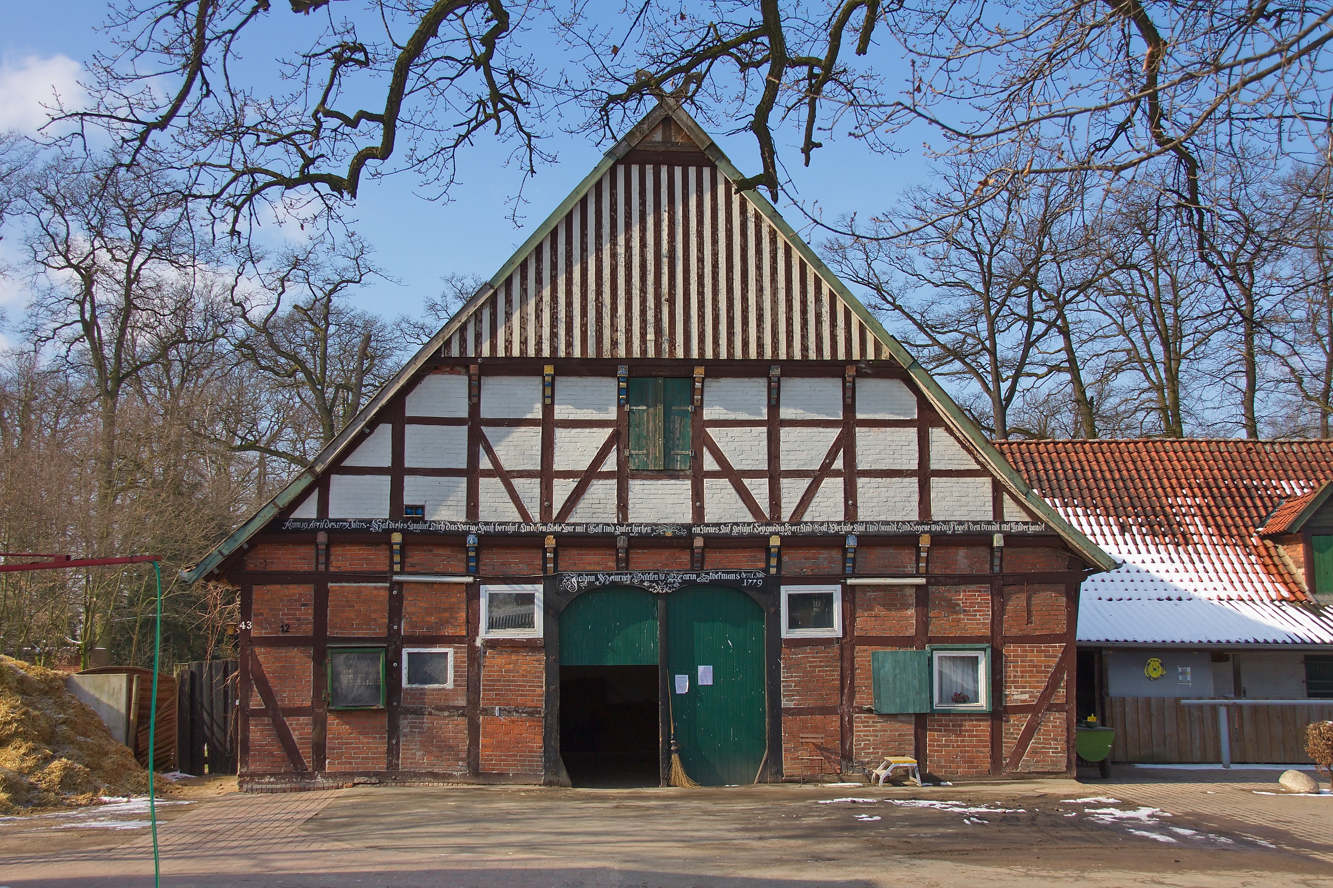 Fachwerkhof von 1779 an der Burgwedeler Straße 43 in der Hohenhorster Bauerschaft (Isernhagen), Niedersachsen, Deutschland